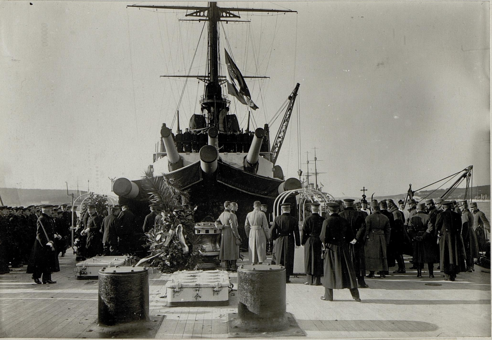 Grossadmiral Haus verstarb auf seinem Flaggschiff Viribus Unitis am 8.2.1917